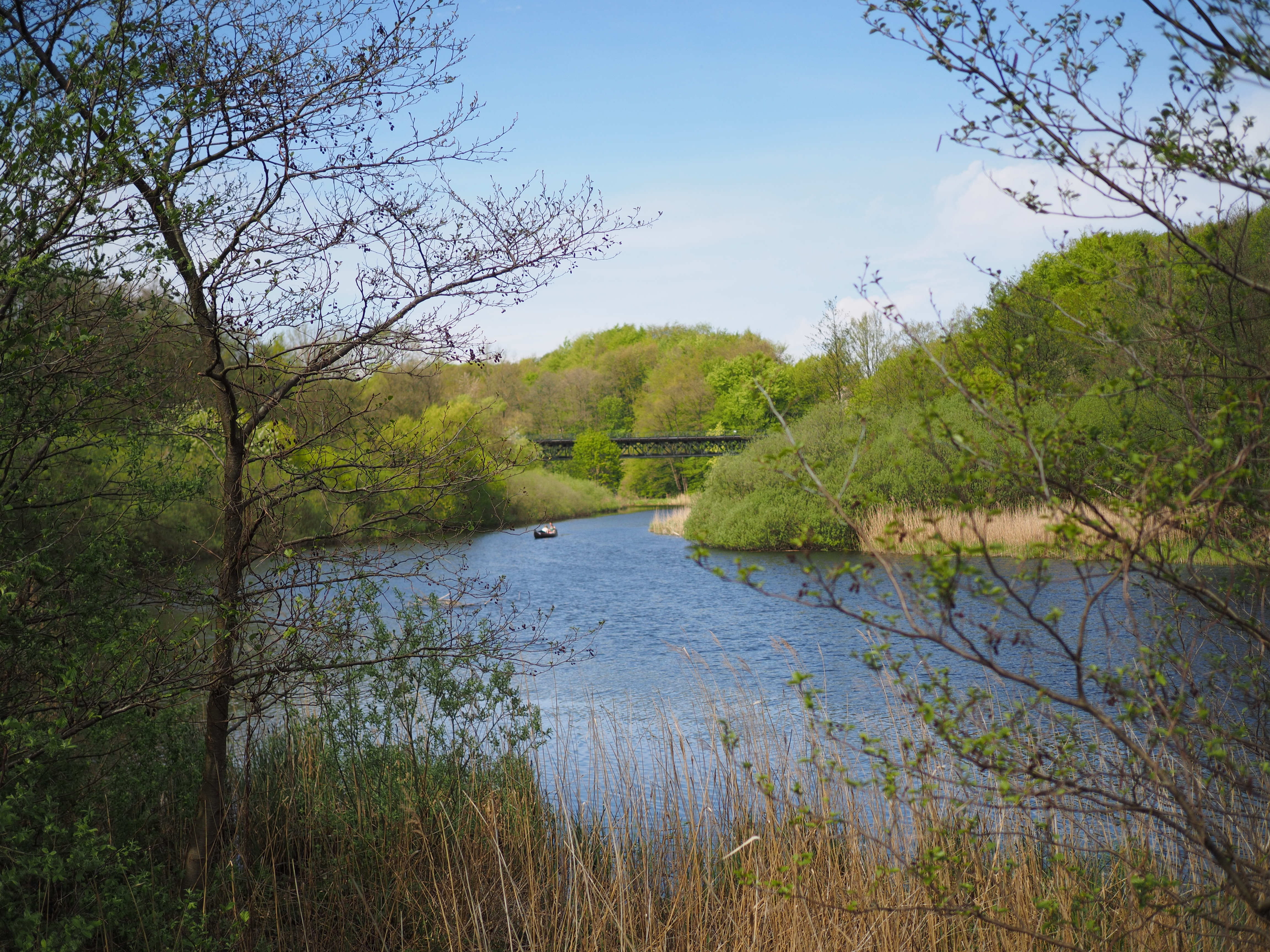 Blick auf Eisenbahnbrücke; Landschaftsschutzgebiet „Schwentinetal im Kreis Plön im Verlauf vom Stadtgebiet Preetz bis an die Stadtgrenze von Kiel“ (LSG 57-PLOE-18)